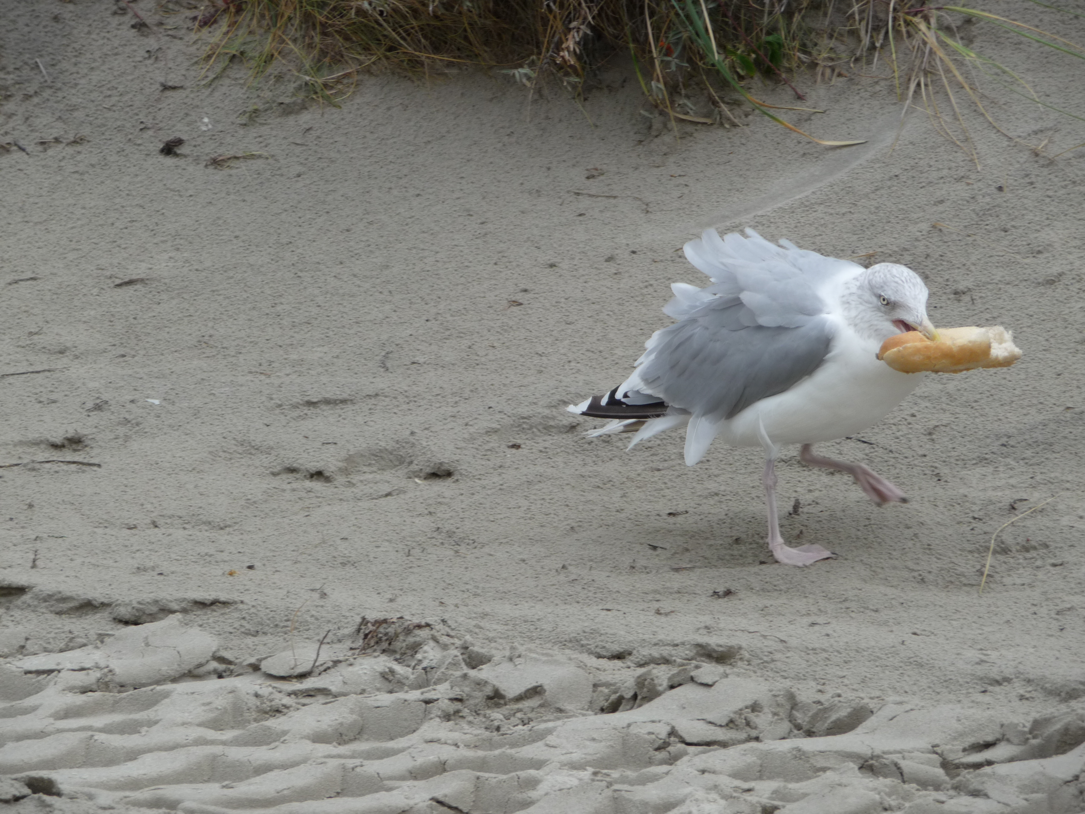 Silbermöwe (Larus argentatus) mit einem Baguettebrötchen, das sie kurz zuvor einem unvorsichtigen Touristen aus der Hand gerissen hat, aufgenommen auf der ostfriesischen Nordseeinsel Juist (Niedersachsen, Deutschland)